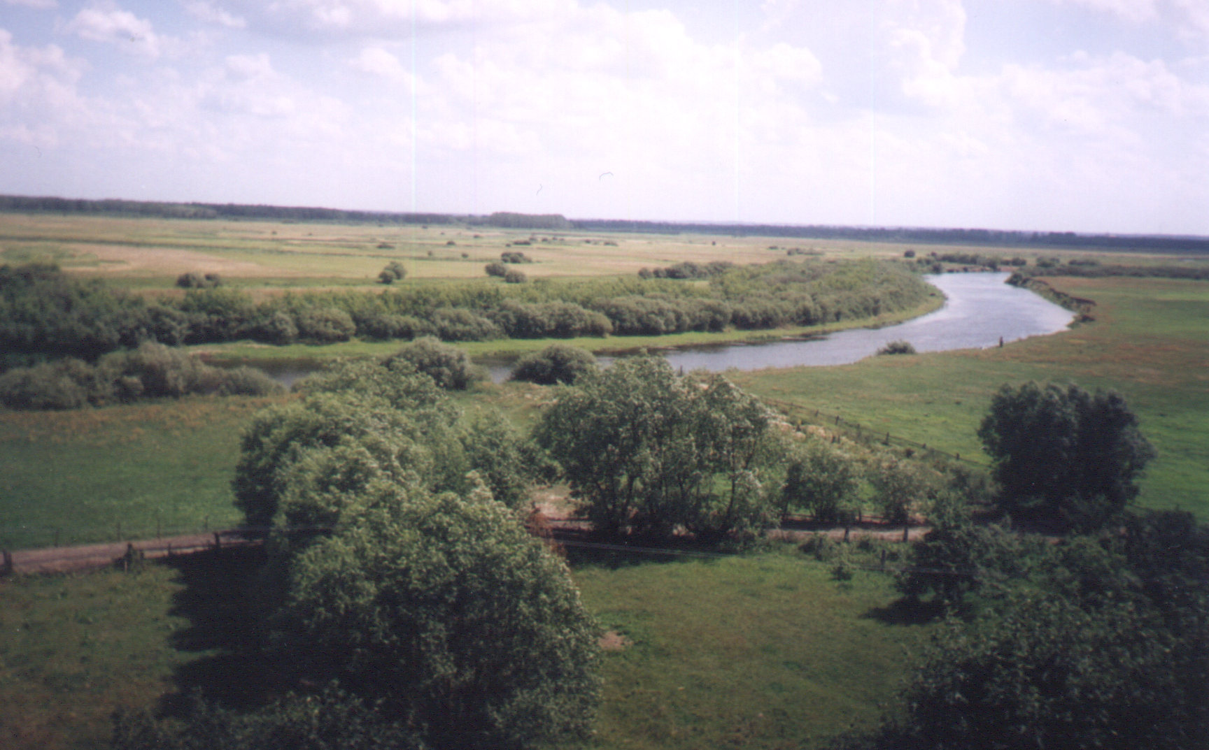 Rzeka Narew, koło Łomży i Drozdowa